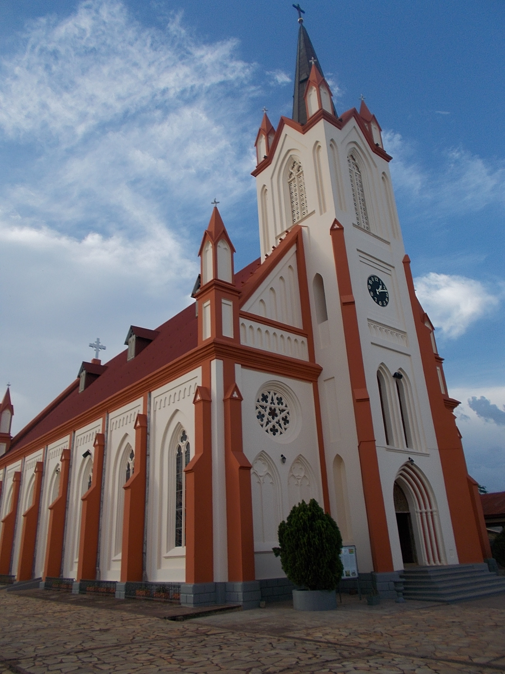 Church of Kpalimé